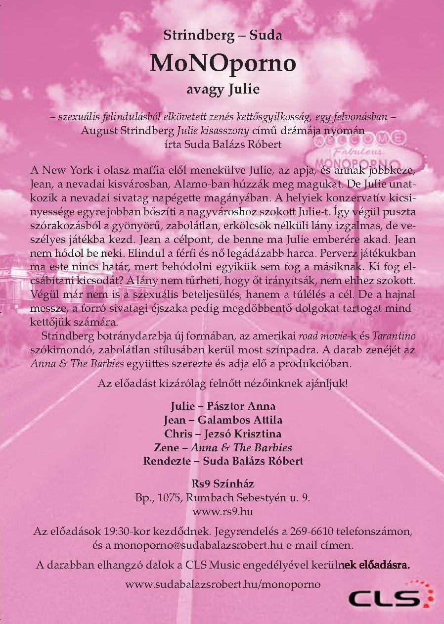 A MoNoporno avagy Julie előadás szórólapjának hátlapja. Budapest.